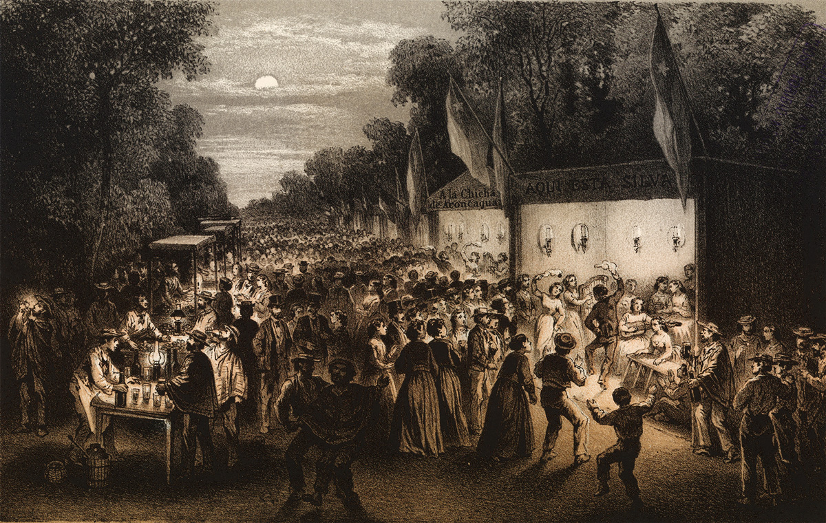 Noche Buena en la Cañada, grabado en Chile Ilustrado de 1872.